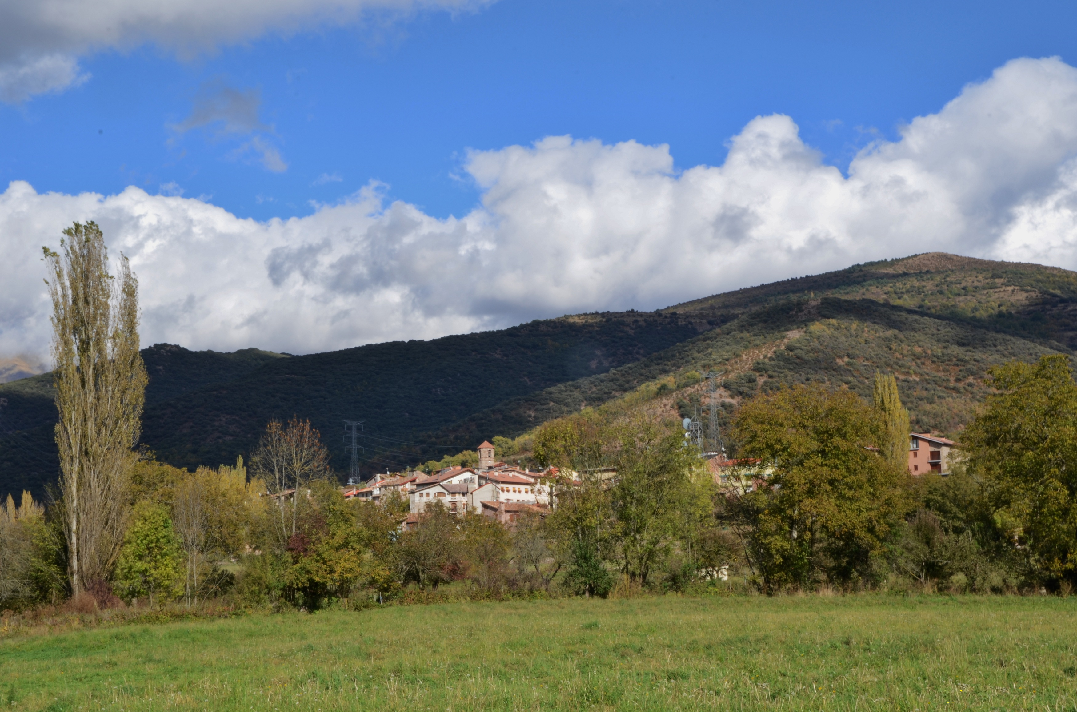 La Pobleta de Bellveí